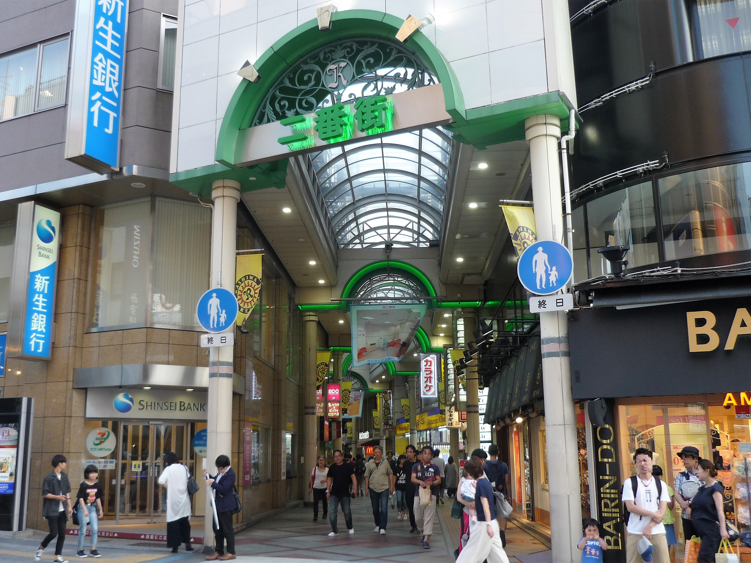 柏二番街（柏駅東口）